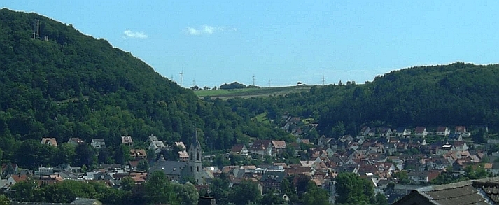 Marsberg, Germany.